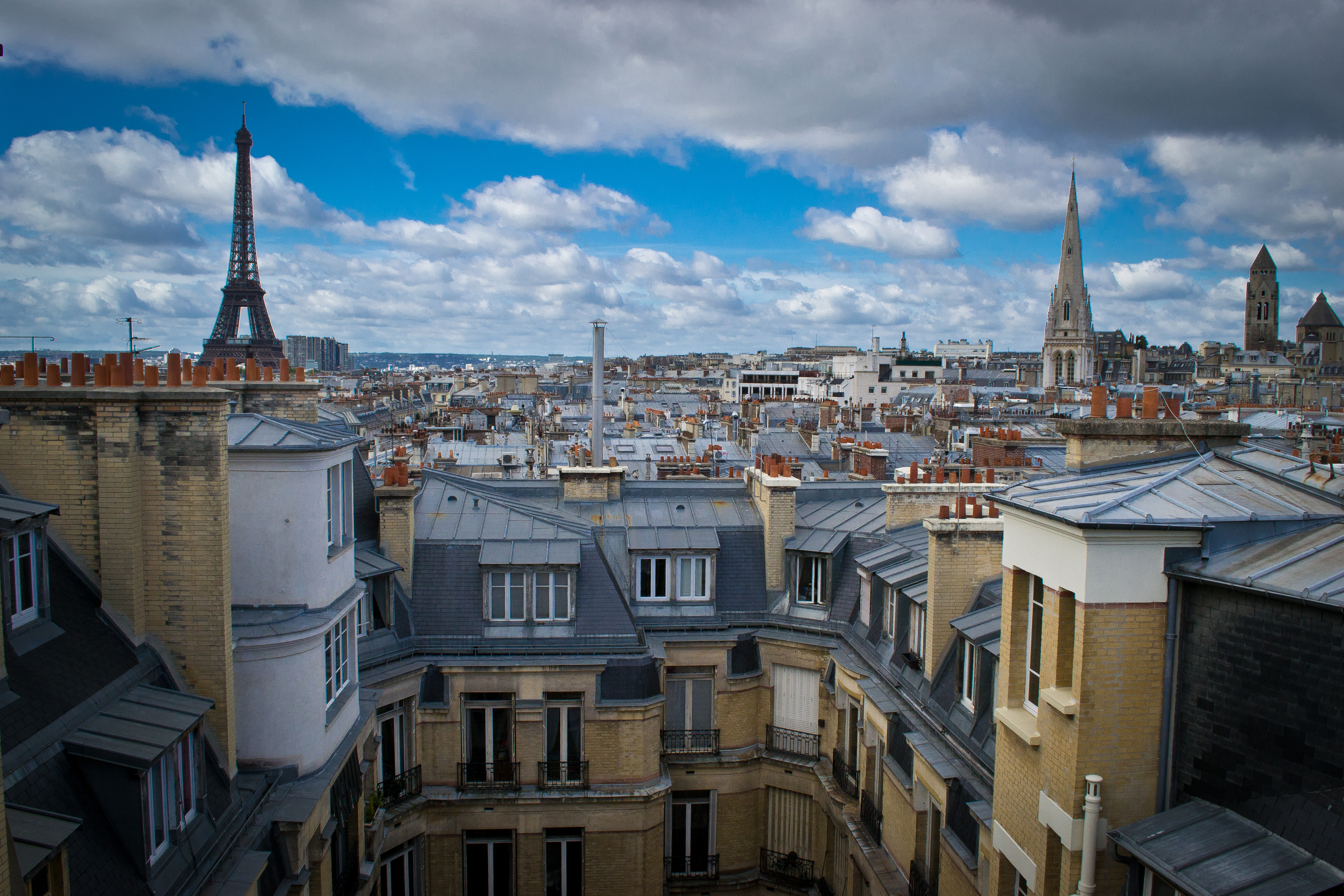 Champs-Élysées, Paris, France